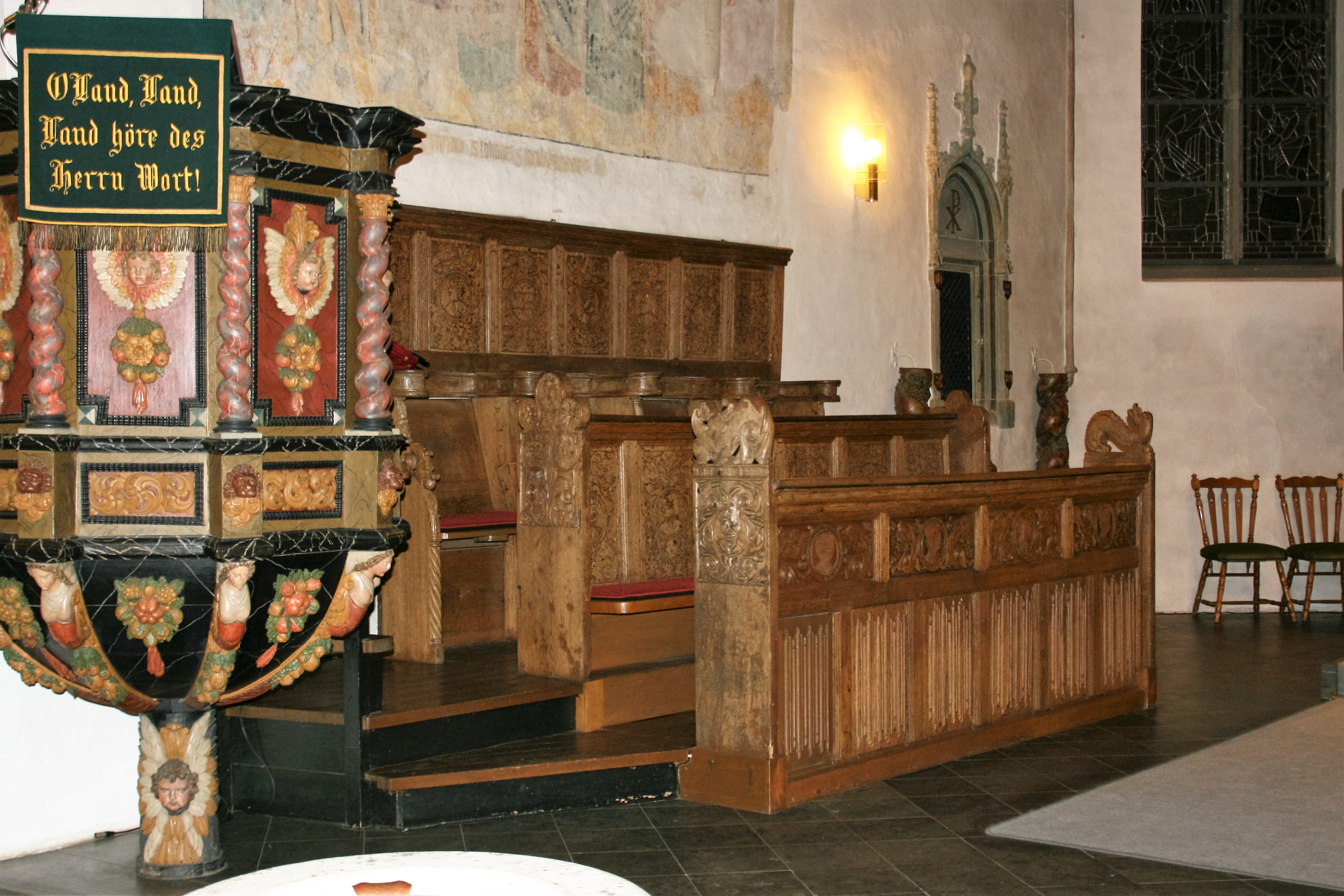 Chorgestühl und Kanzel in der Apostelkirche in Herscheid (Märkischer Kreis).